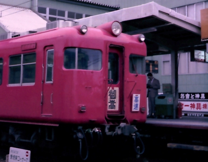 名古屋鉄道モ5509号御嵩高速